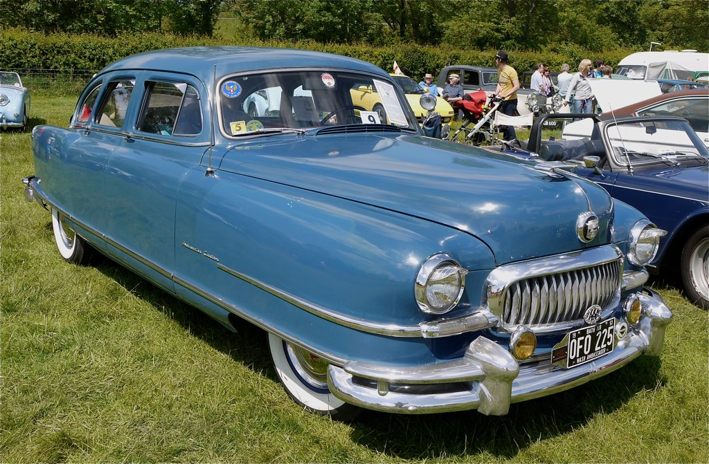 Panasonic G1 14-45 Lens